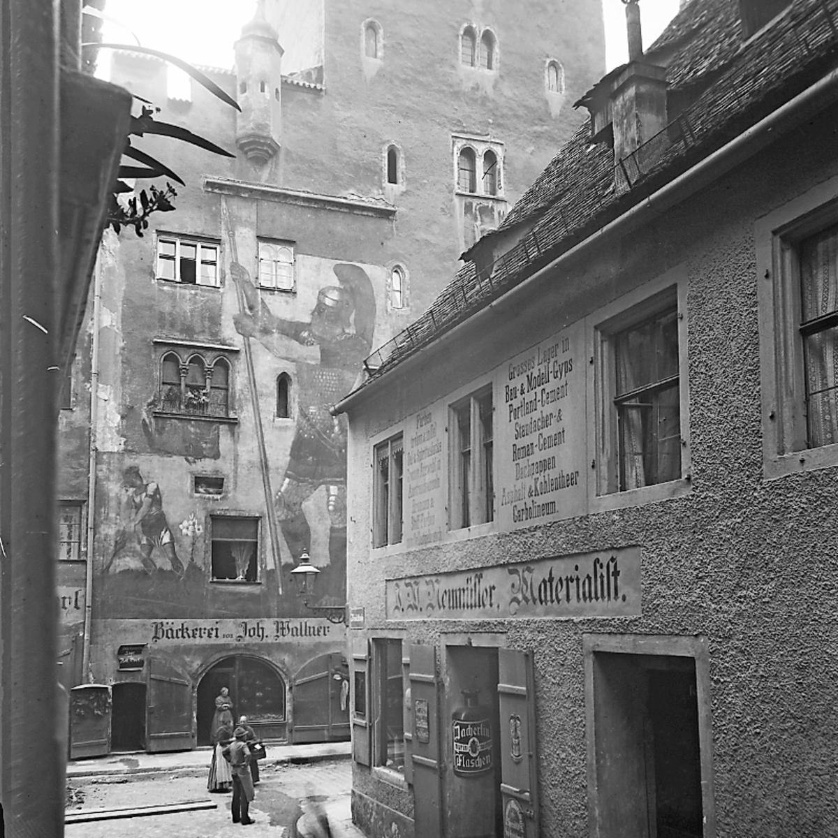 Das Goliathhaus in Regensburg um 1895. Bild aus dem Plan- und Bildarchiv am Landesamt für Denkmalschutz Bayern.